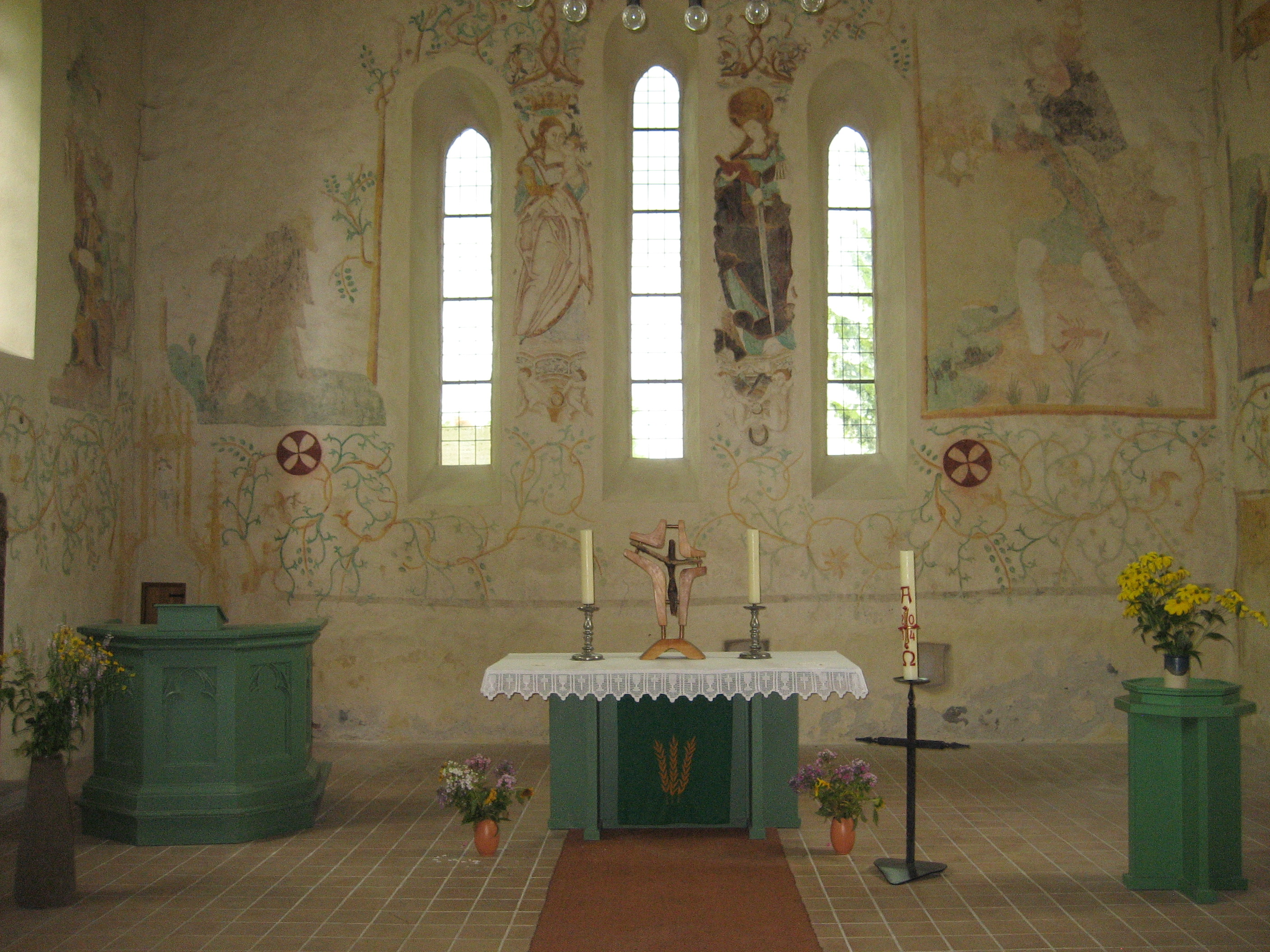 Der Kanzelkorb (li.) und der Altar (mi.) vor der Ostwand der Zerrenthiner Kirche.